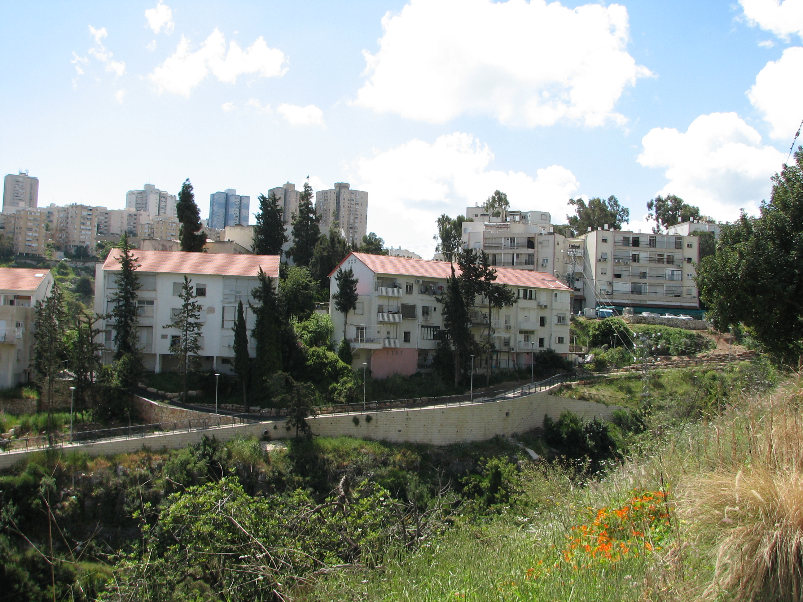 Ramat Vizhnitz, Hadar Hacarmel' Haifa Israel רמת ויז'ניץ או בשמה הנוסף משכן ישראל היא שכונת מגורים בחיפה, שבה מתגוררים חסידי סרט ויז'ניץ ובה קיימים מוסדות החסידות. השכונה שוכנת במזרח הדר הכרמל מבט על השכונה מקצה רחוב השילוח